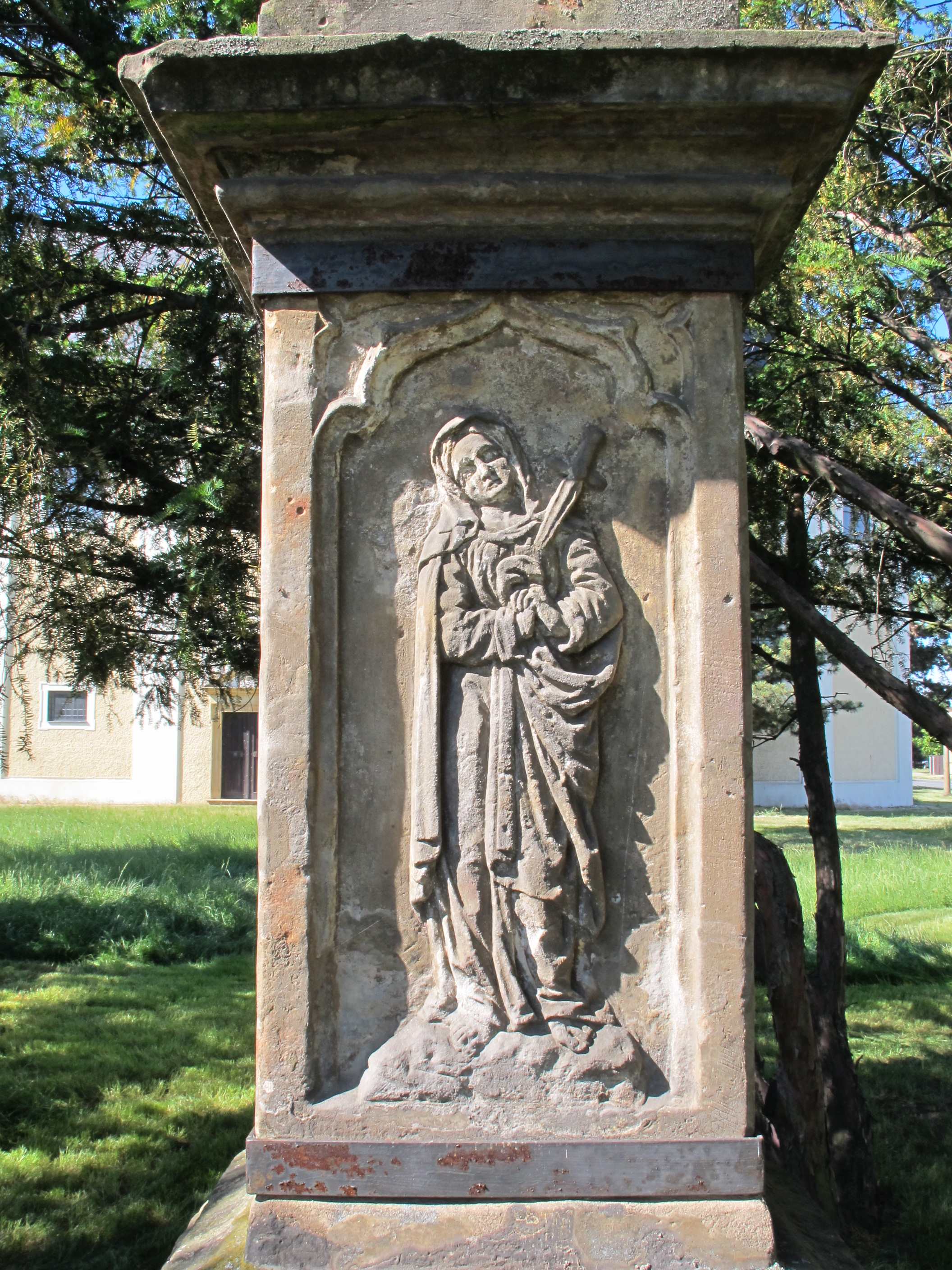 Sloup Nejsvětější Trojice, Staroměstské náměstí, Litovel. This file was uploaded during the project of WikiTown Litovel.